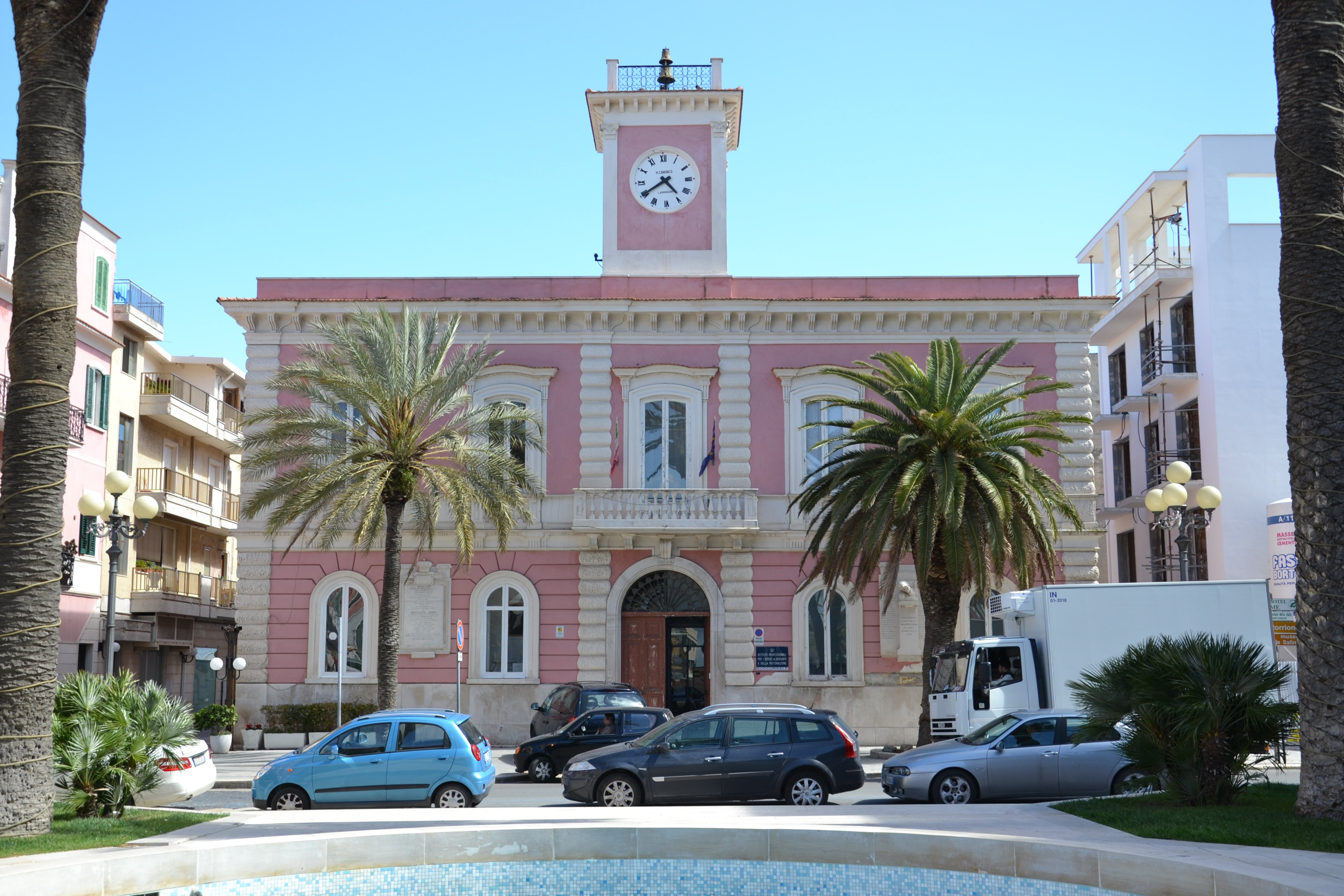 Il municipio